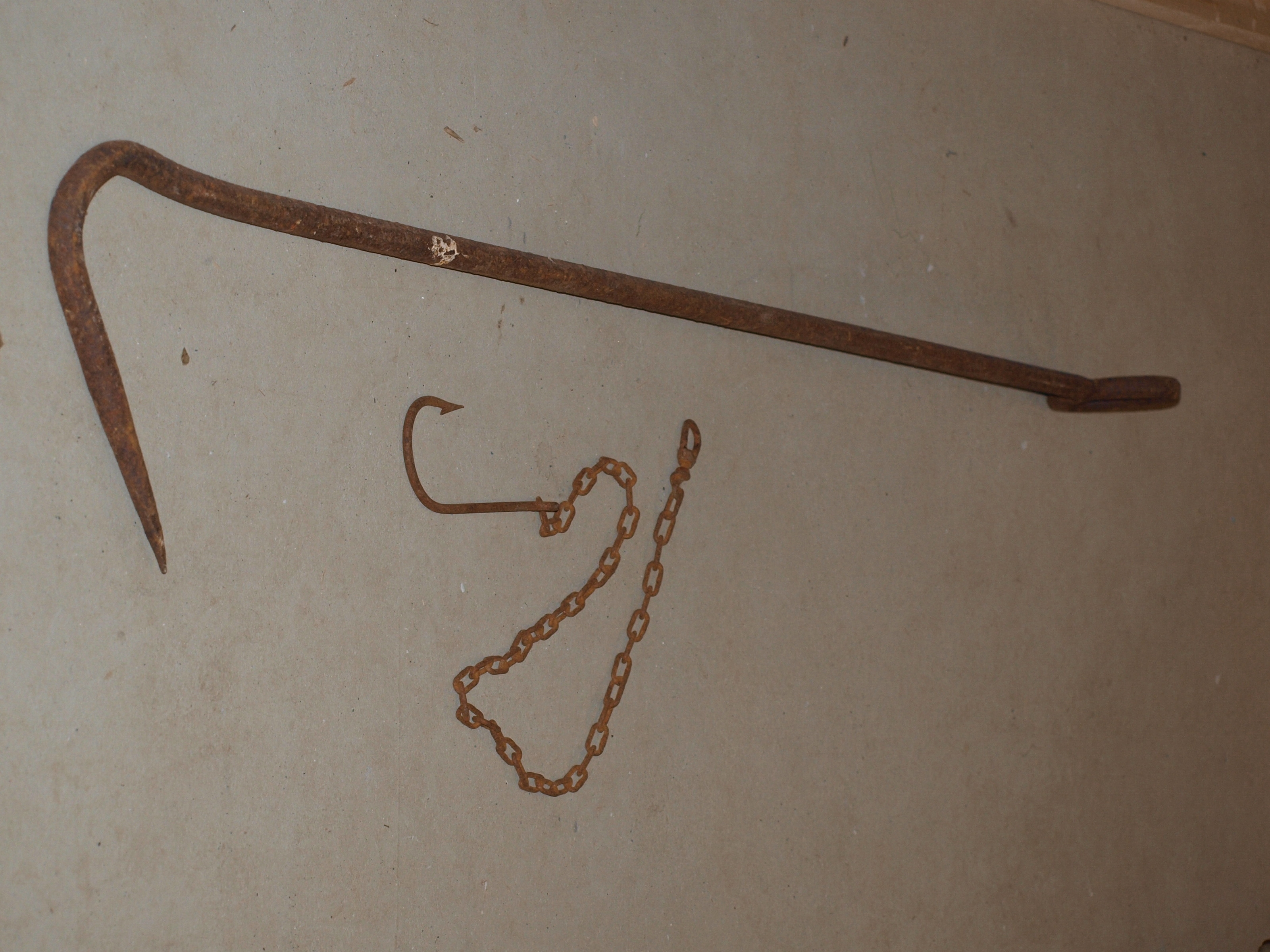 Krok til å kroke i håkjerring for å ta ho ombord i fiskefartøyet